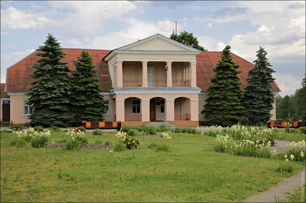 Гнезна. Сядзіба